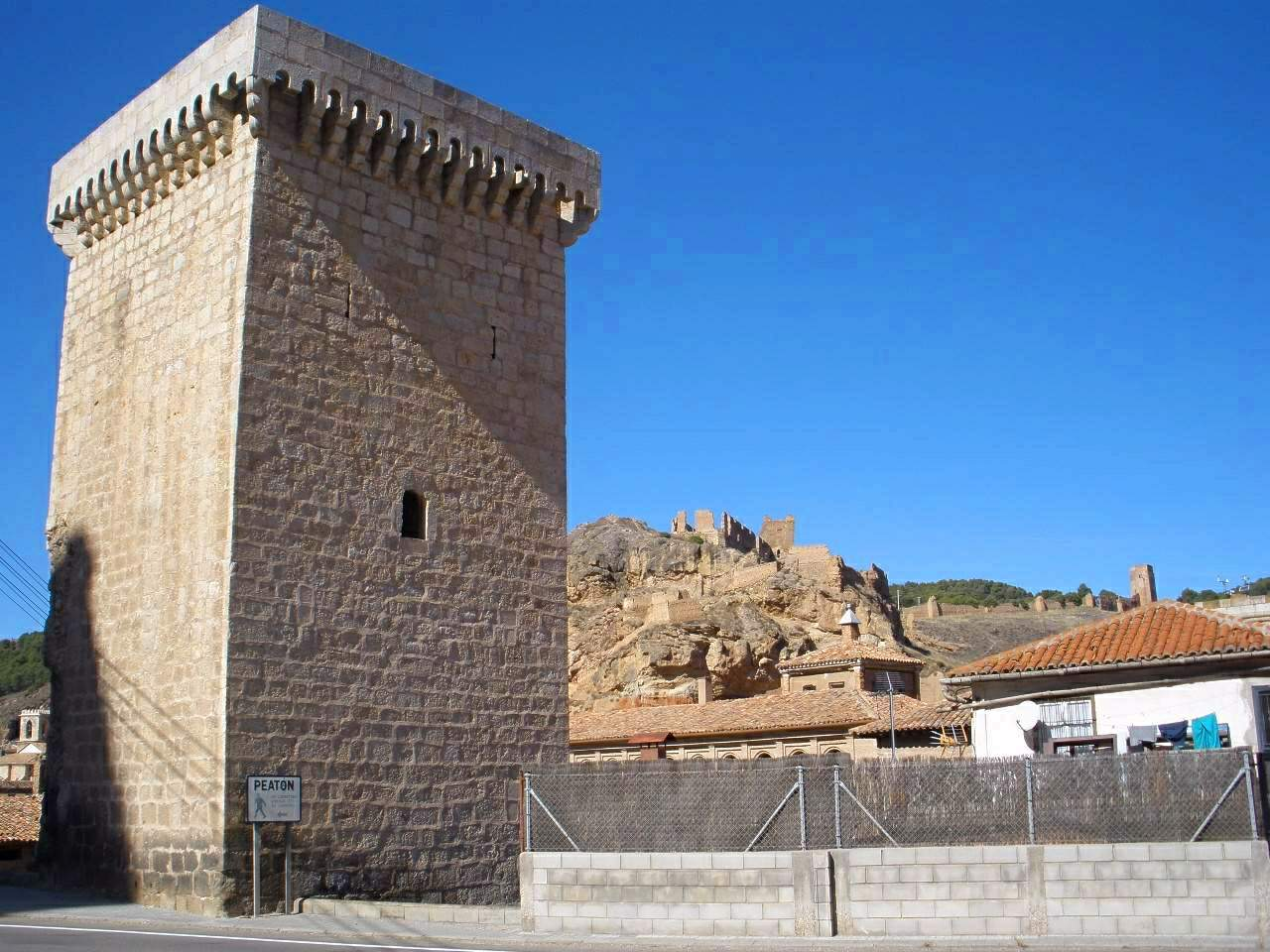 Recinto amurallado de Daroca (Zaragoza)